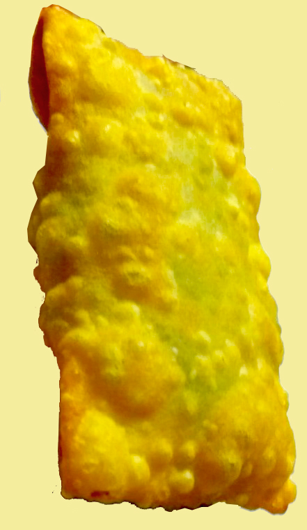 सांभार-वडी